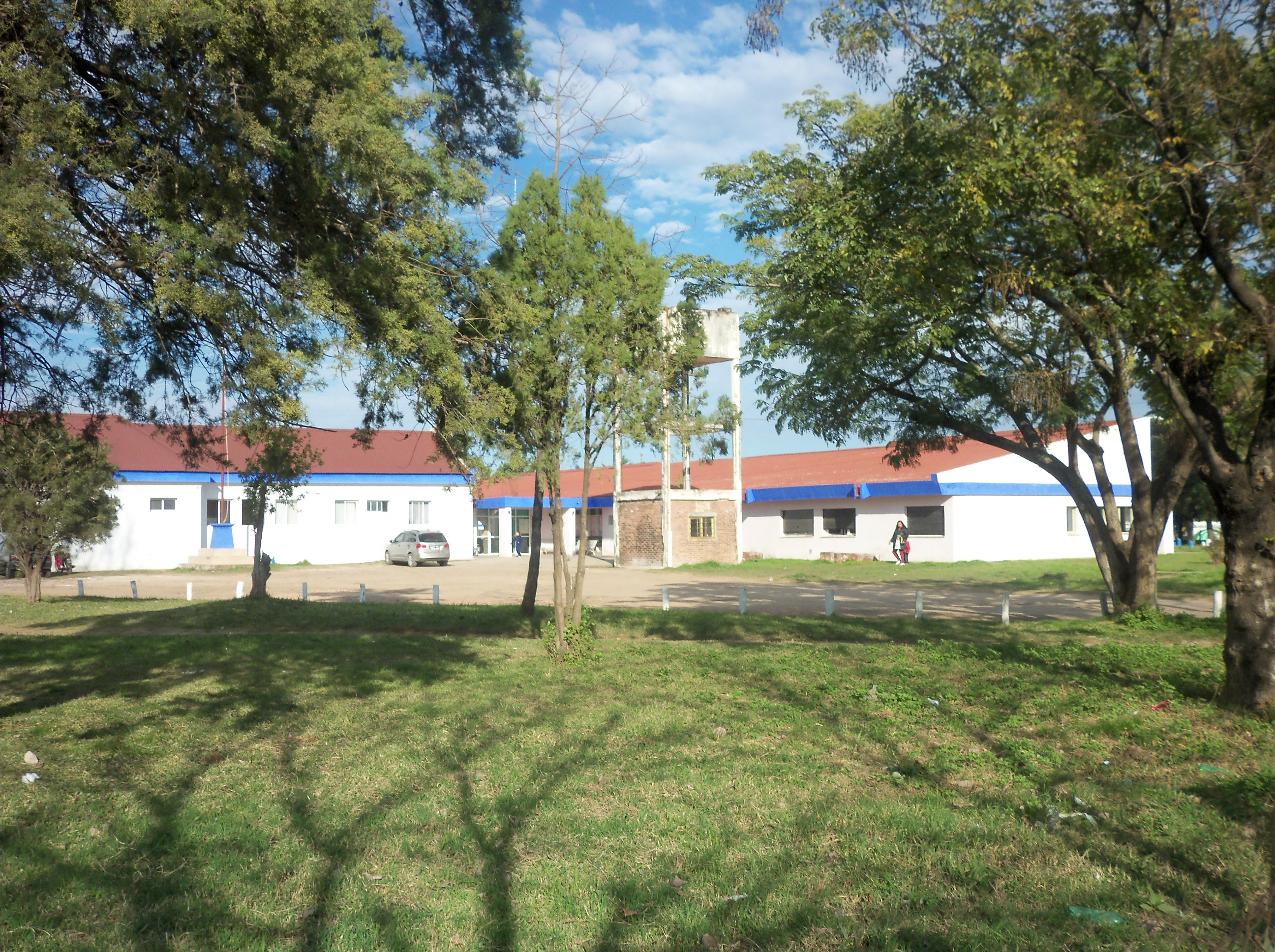 Imagen actual tomada desde el noreste.